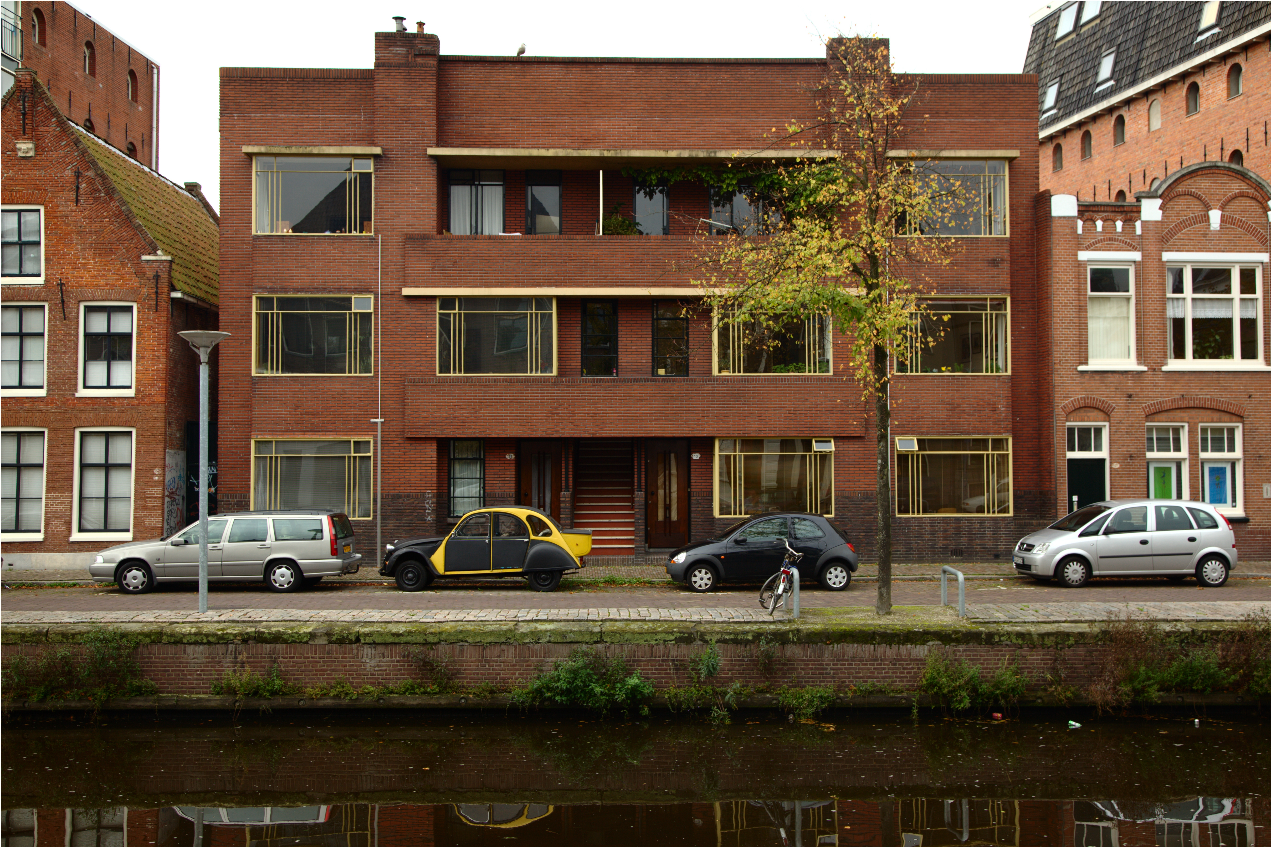 Lage der A 9 t/m 10b. Wooncomplex gebouwd in 1933 naar ontwerp van de Groninger architect H.B. Bulder in de stijl van de Nieuwe Zakelijkheid, rm 485817. Links een deel van Lage der A 8 (rm 18540).